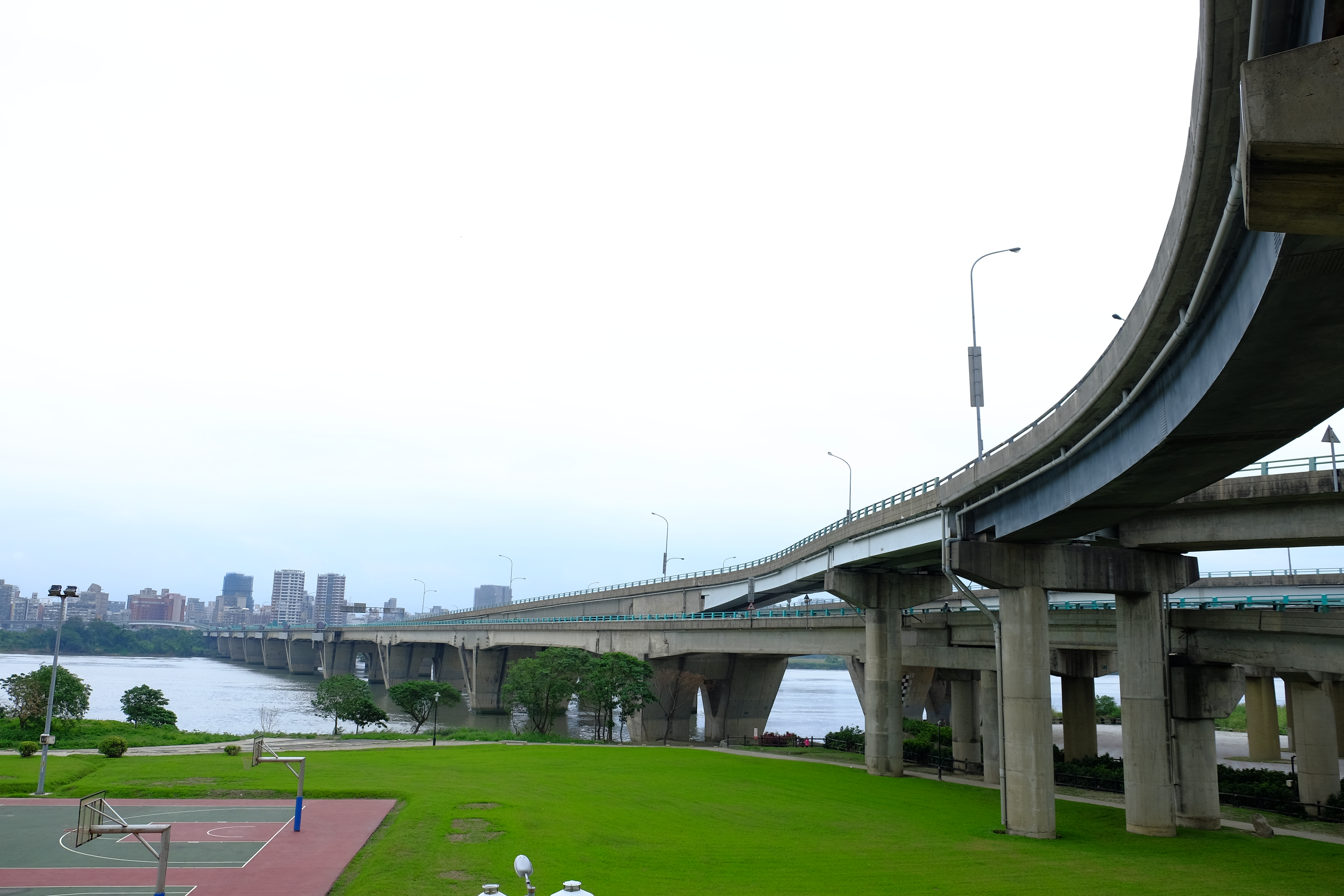 中興橋三重端。